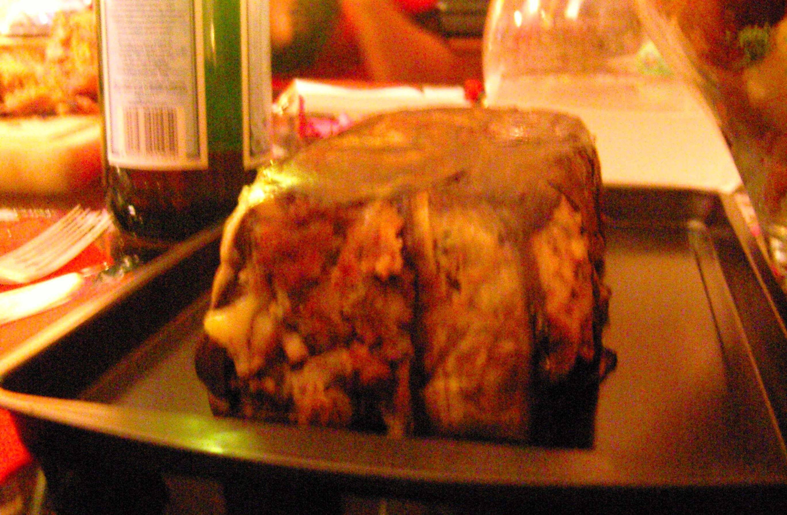 Nut roast - vegetarian alternative ro roast meat